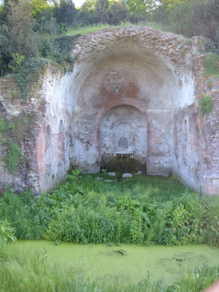 Ninfeo d'Egeria al Parco della Caffarella a Roma.